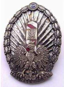 Odznaka "Za Służbę Graniczną", wzorowana na przedwojennej odznace KOP ... Translation: Polish » English For službe graniczna.jpg Medal "For Service Boundary", modeled on the prewar odznace KOP